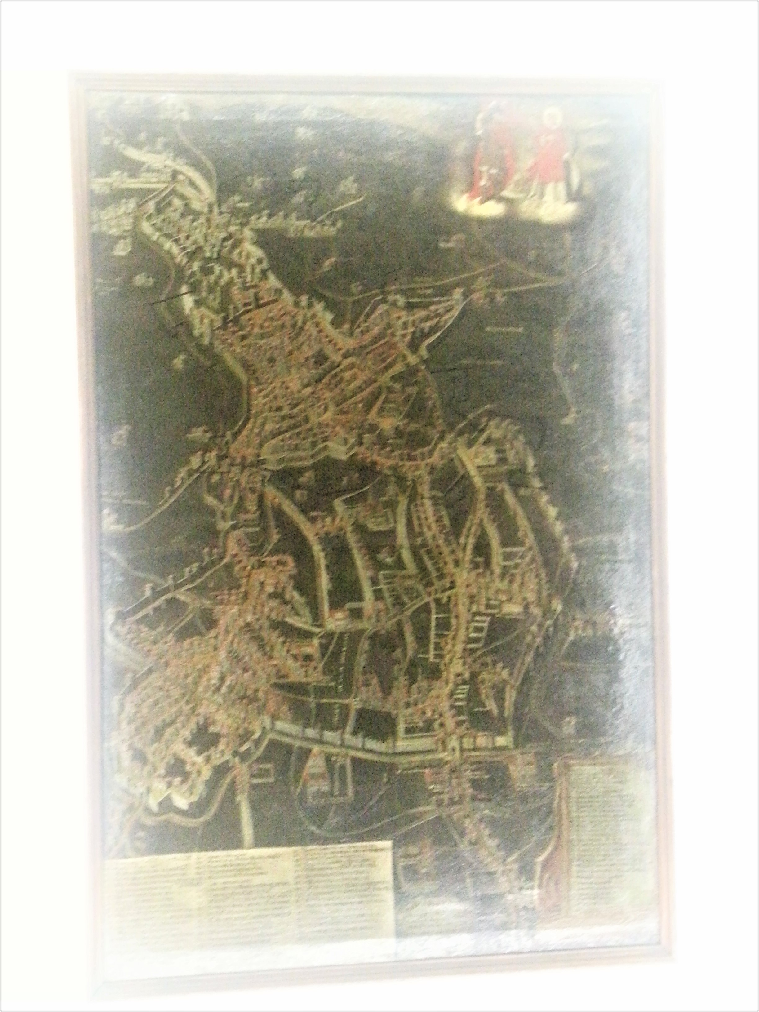 antica cartina conservata nel museo del cinqueento con la città riprodotta prima della costruzione delle mura venete del 1561